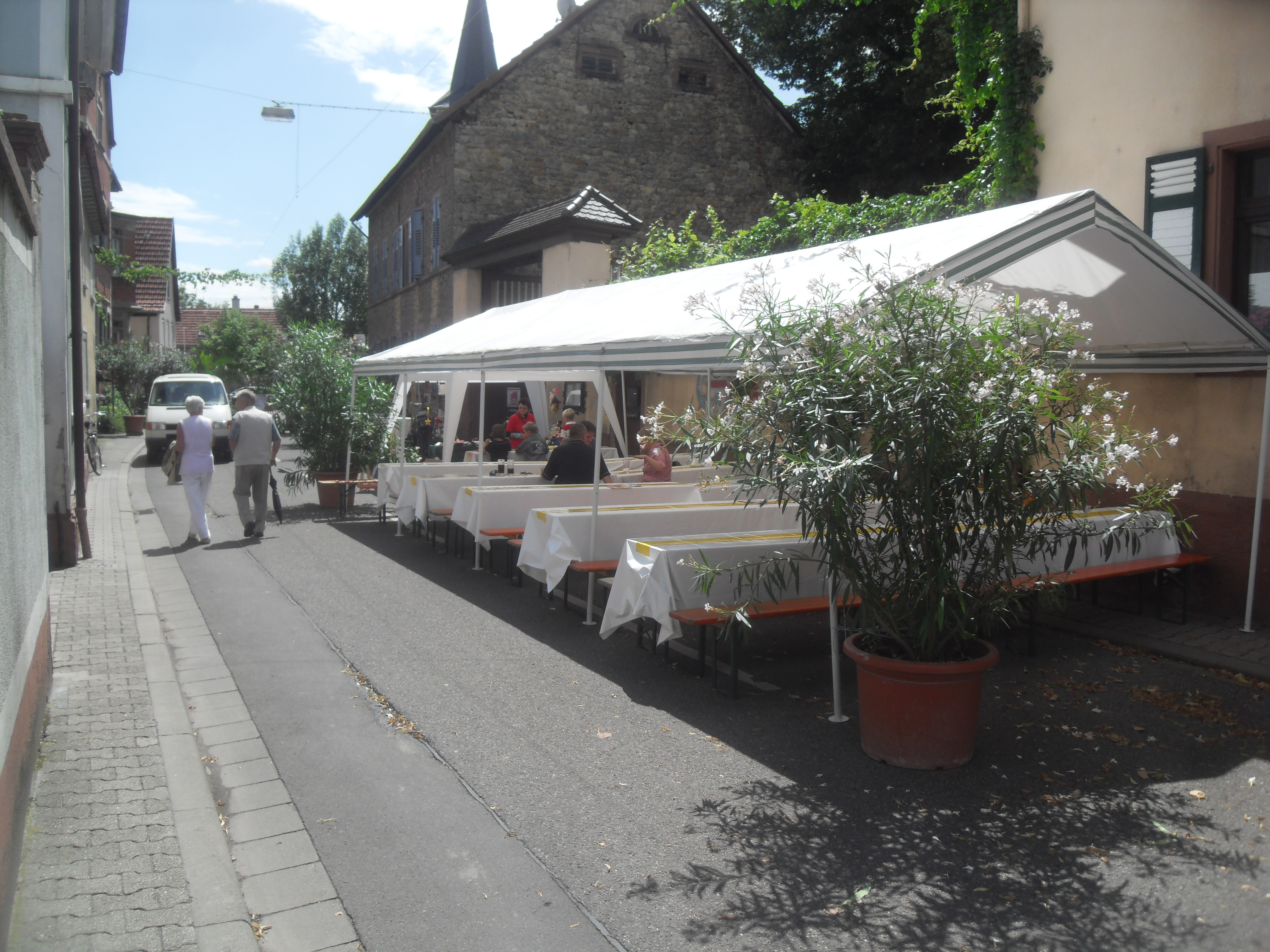 Festzelt vor dem Weingut Homburger Hof auf der Alsheimer Straße in Guntersblum